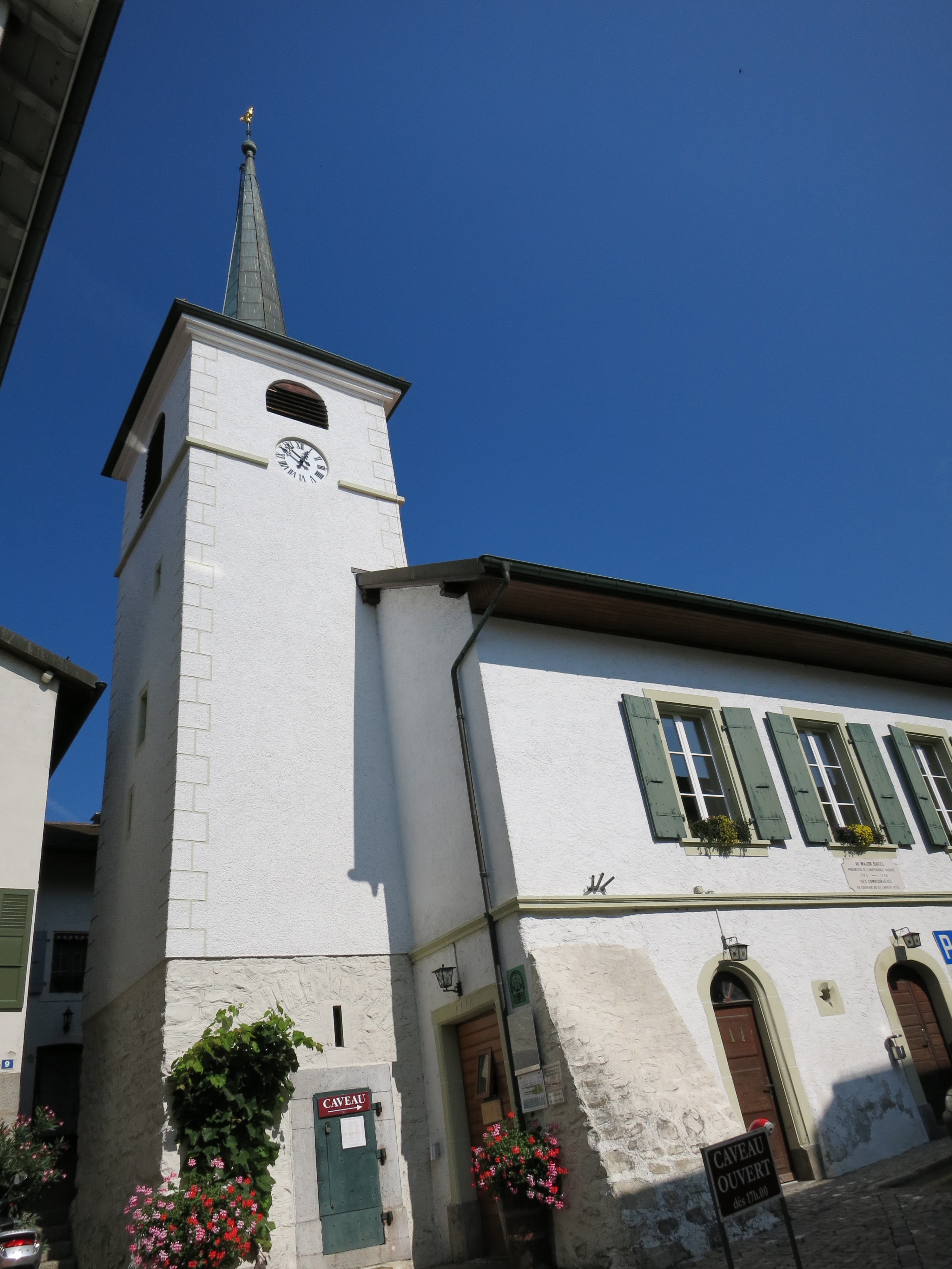 St-Theodule, Riex VD, Schweiz